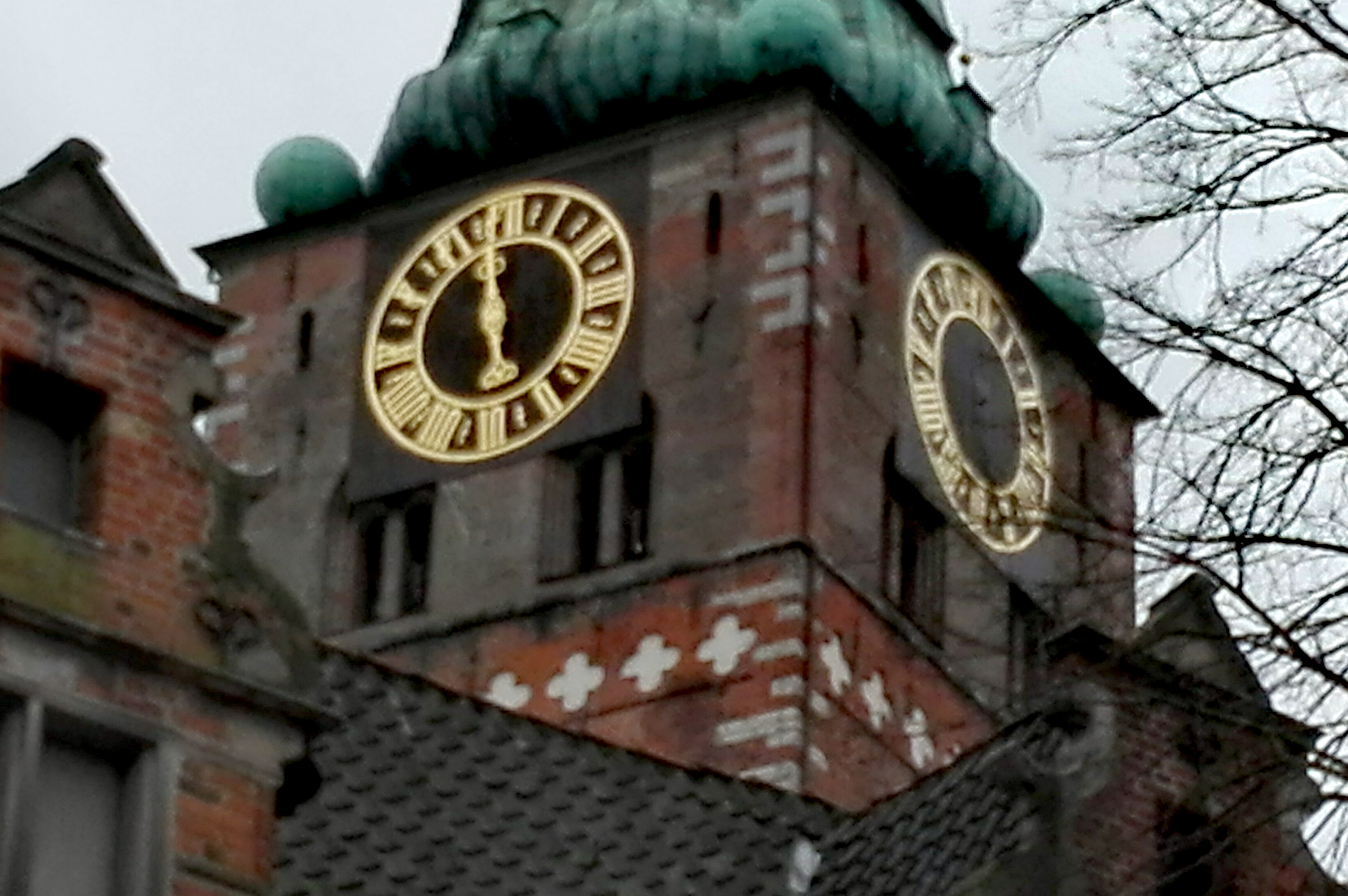 Der riesige goldene Zeiger lag verbogen und zertrümmert am Boden. Großes Glück im Unglück: Kein Mensch wurde verletzt, als ein Zeiger der Turmuhr von St. Jakobi am Dienstagnachmittag aus noch ungeklärter Ursache plötzlich abstürzte. Auch auf dem Kirchengelände parkende Fahrzeuge wurden nicht beschädigt. „Man mag sich gar nicht ausmalen, was hätte passieren können“, sagte Pastor Lutz Jedeck, der sich gerade nicht in Lübeck aufhält, am Mittwoch den LN.